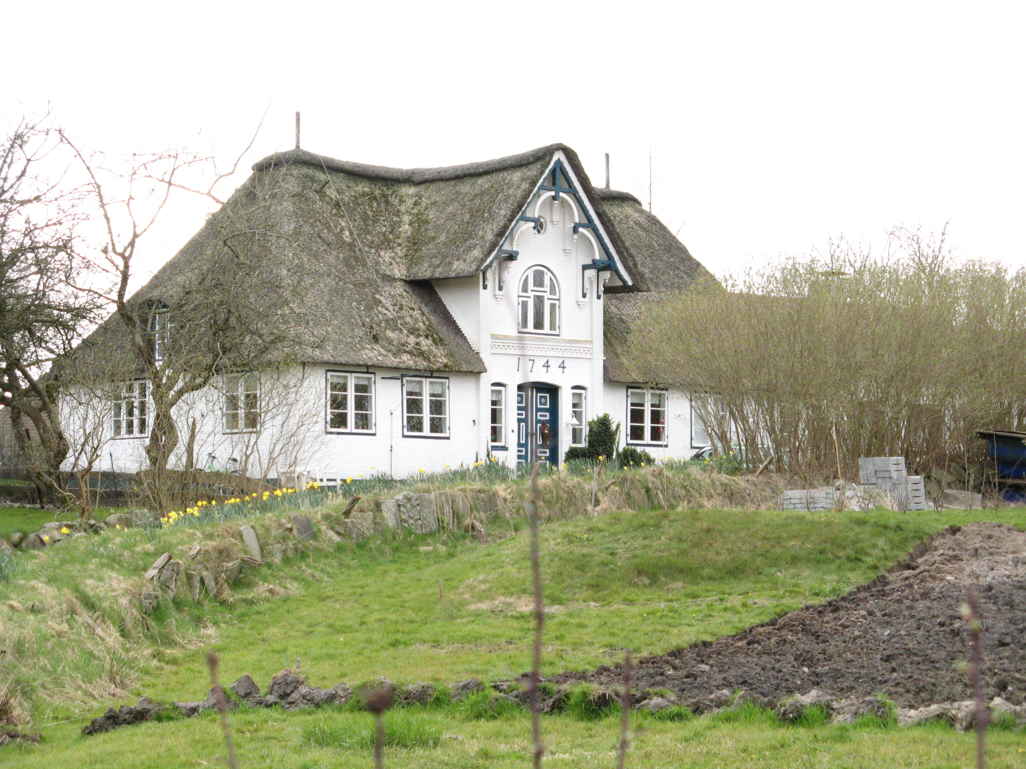 Farm in Süderstapel Author: Dirk Ingo Franke